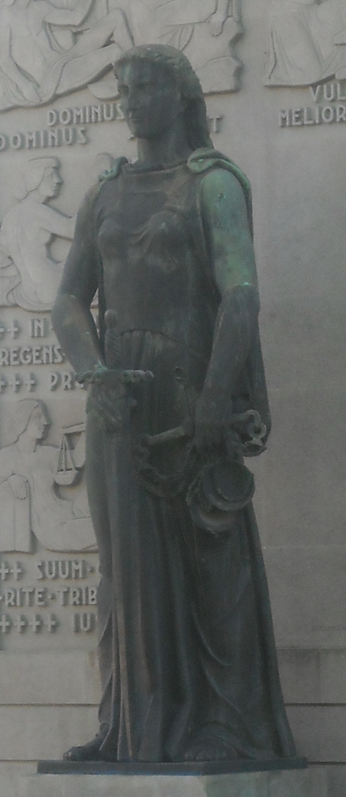 escultura da justiça na frente do Palácio da Justiça da cidade do Porto.